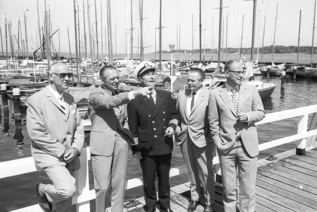 V.l. Herbert Kunze, Generalsekretär des Deutschen Segler-Verbandes (DSV), Berthold Beitz, Vorsitzender des Segelausschusses, Peter Lohmeyer, Kapitän der HANSEATIC und ehemaliger Kommandant der GORCH FOCK, Willi Daume, Präsident des Nationalen Olympischen Komitees (NOK) und Horst Dieter Marheineke, Leiter des Olympiareferats der Stadt.